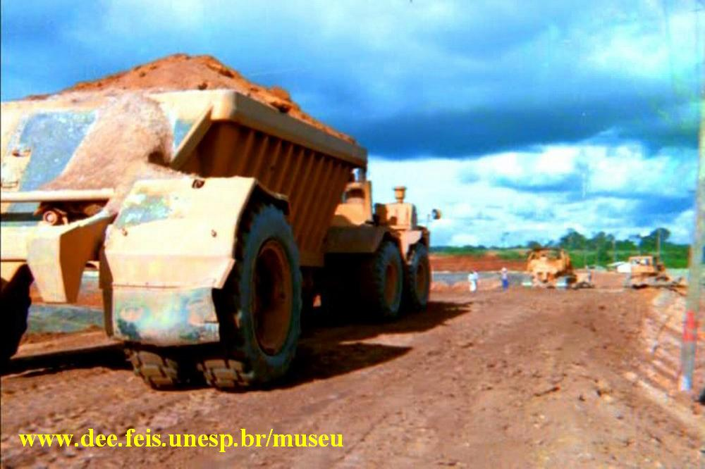 Tucuruí - Histórica